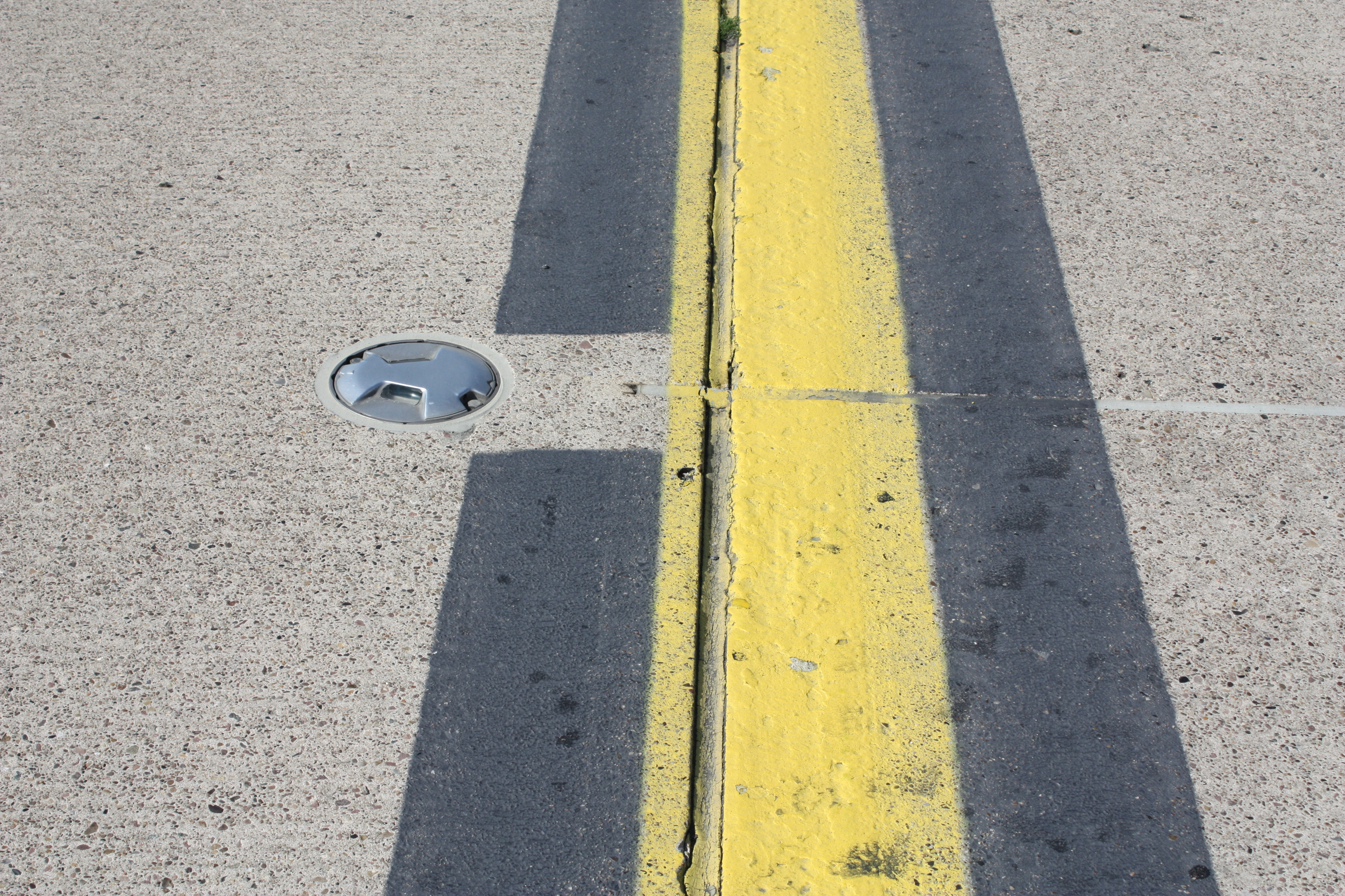 Bremen Airport Flugtag 2009